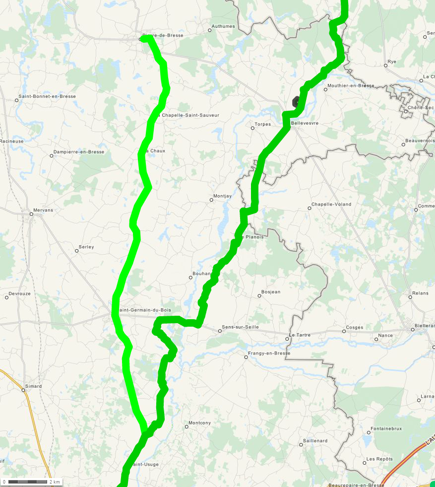 Karte der Römerstraßen in der Bresse - Zweig Louhans nach Pierre-de-Bresse Carte des voies romaines en Bresse - Branche de Louhans à Pierre-de-Bresse This map may be incomplete, and may contain errors. Don't rely solely on it for navigation.